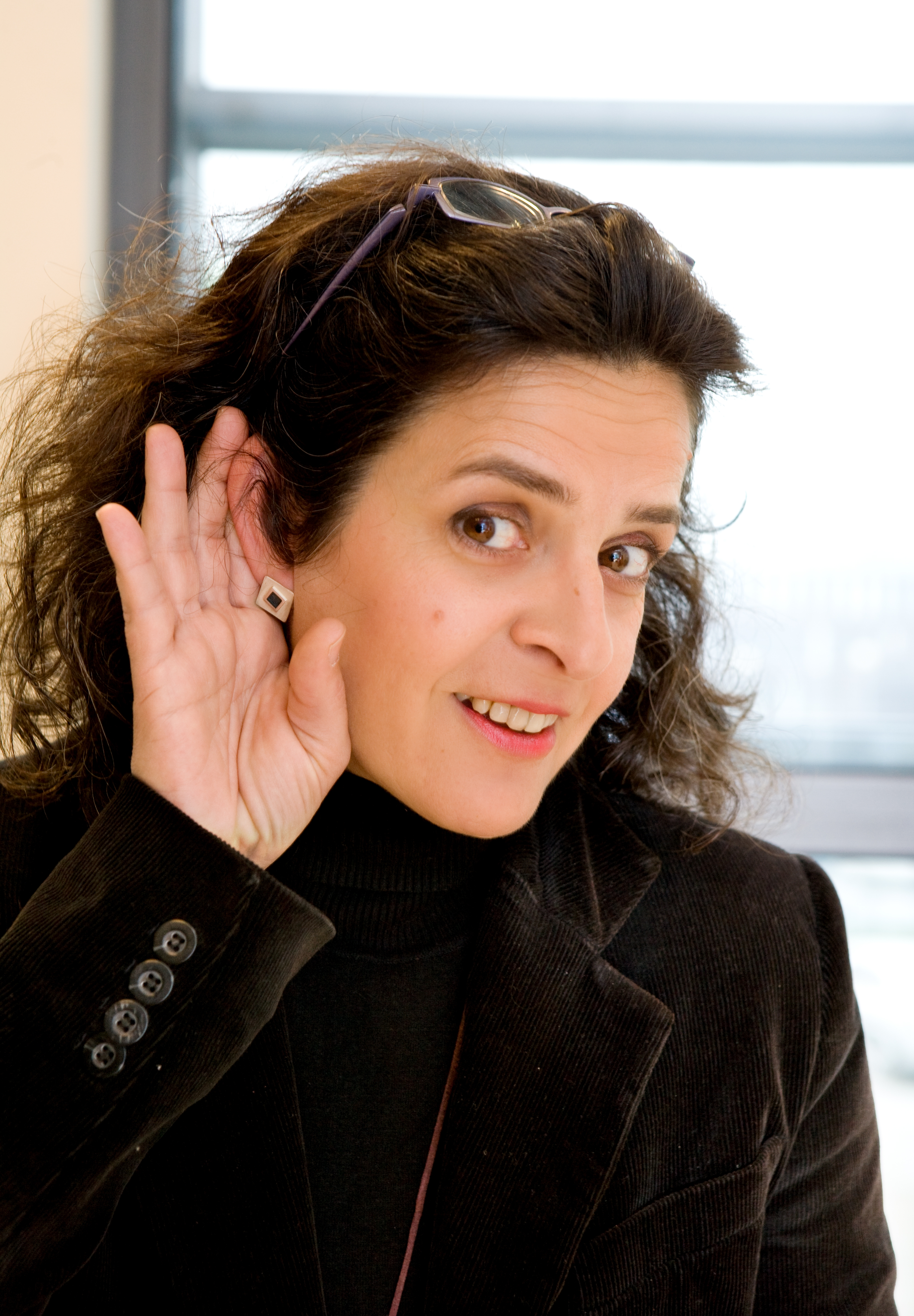 Arantxa Iturbe kazetaria, idazlea eta esataria. Egilea: Dani Blanco